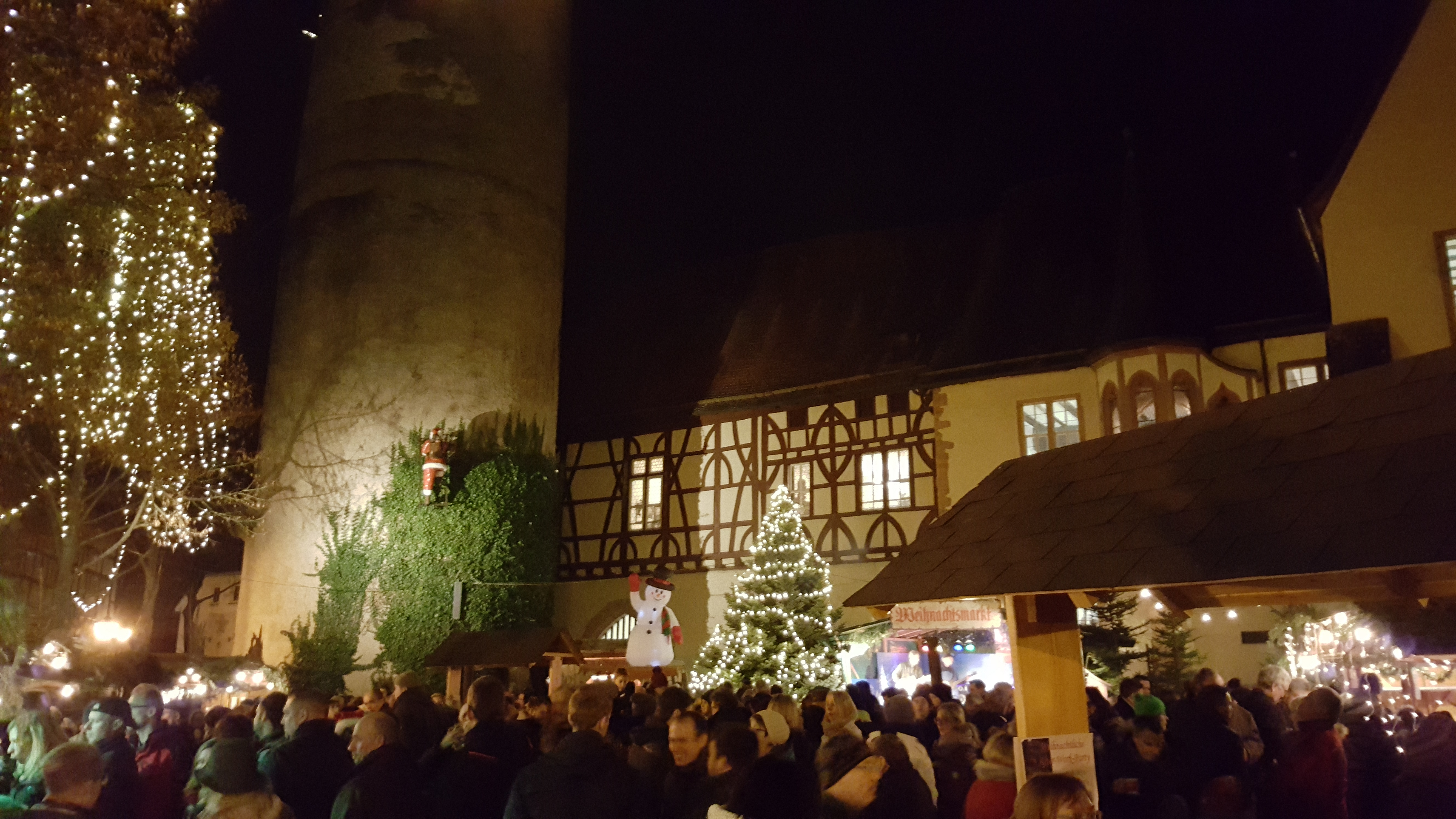 Der Tauberbischofsheimer Weihnachtsmarkt. Eine von der Stadt Tauberbischofsheim veranstaltete "After-Work-Party" auf dem Tauberbischofsheimer Weihnachtsmarkt am 15. Dezember 2016 von 17:30 bis 21 Uhr.